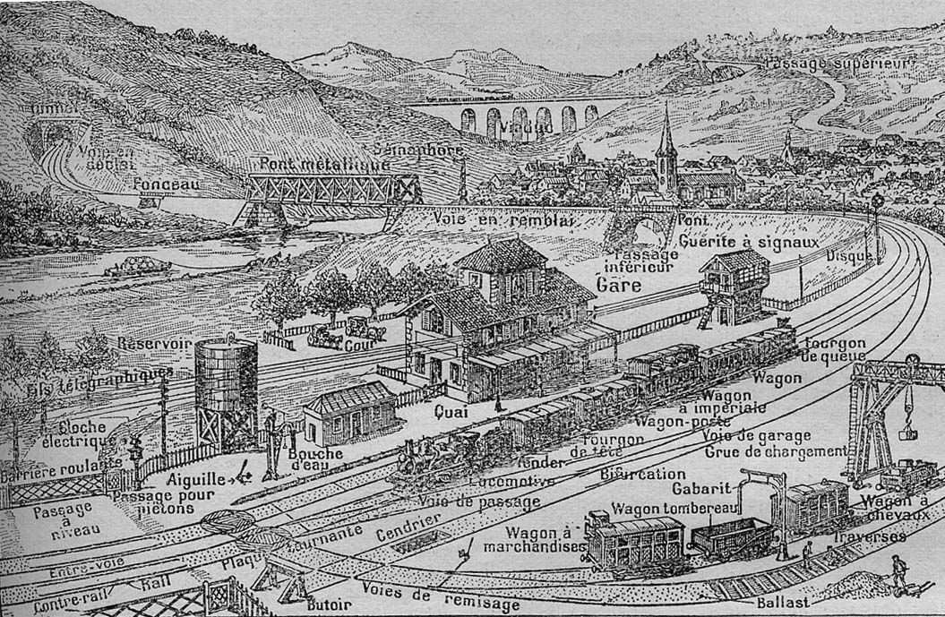 Elementos típicos de un ferrocarril a principios del siglo XX